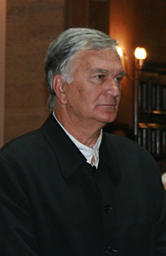 Nikola Bašić, svečano proglašenje i predstavljanje novih članova Hrvatske akademije znanosti i umjetnosti u Zagrebu